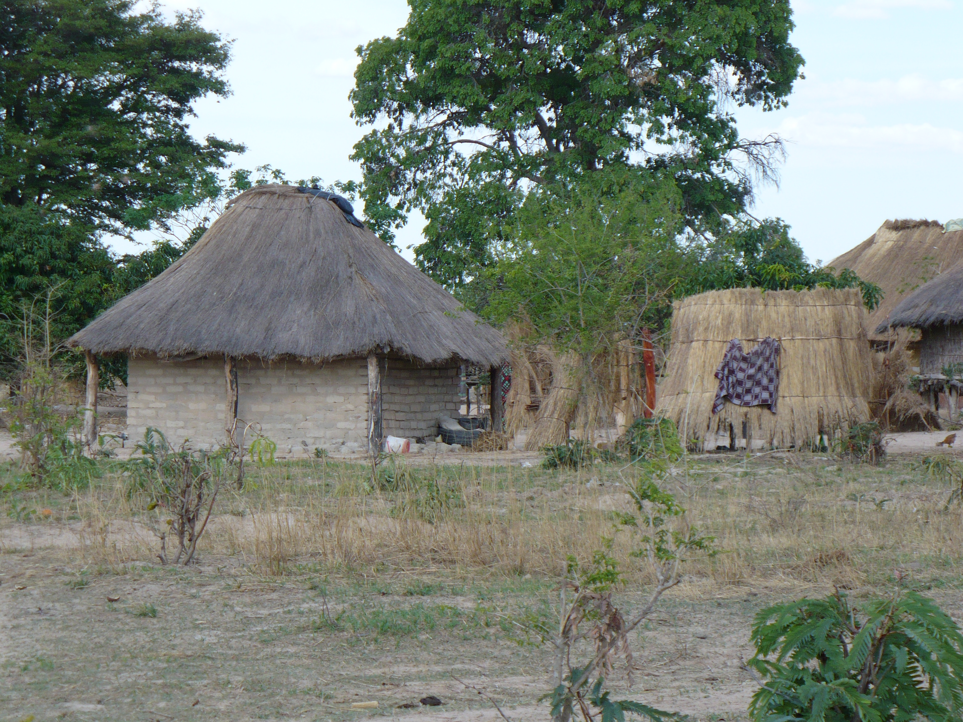 Zambian rural village